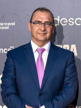 La ciudad de Madrid acogió ayer la I Gala del Baloncesto Español, que ha premiado a los mejores jugadores y jugadoras de la temporada. Un evento deportivo en el que estuvo presente Juan Ignacio Gallardo, director de Marca.